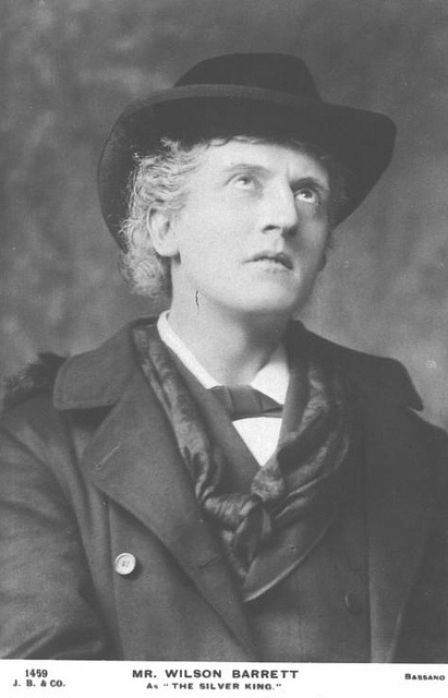 Wilson Barrett (I) (1846–1904) - English manager, actor, and playwright.